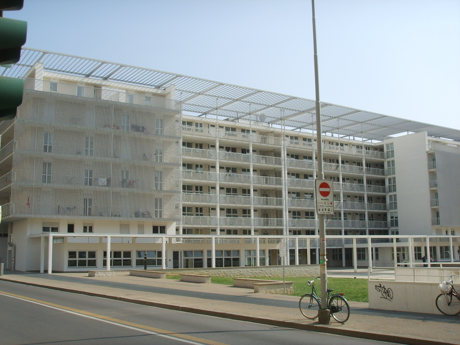 Casa_dello_studente_firenze_day Novoli area